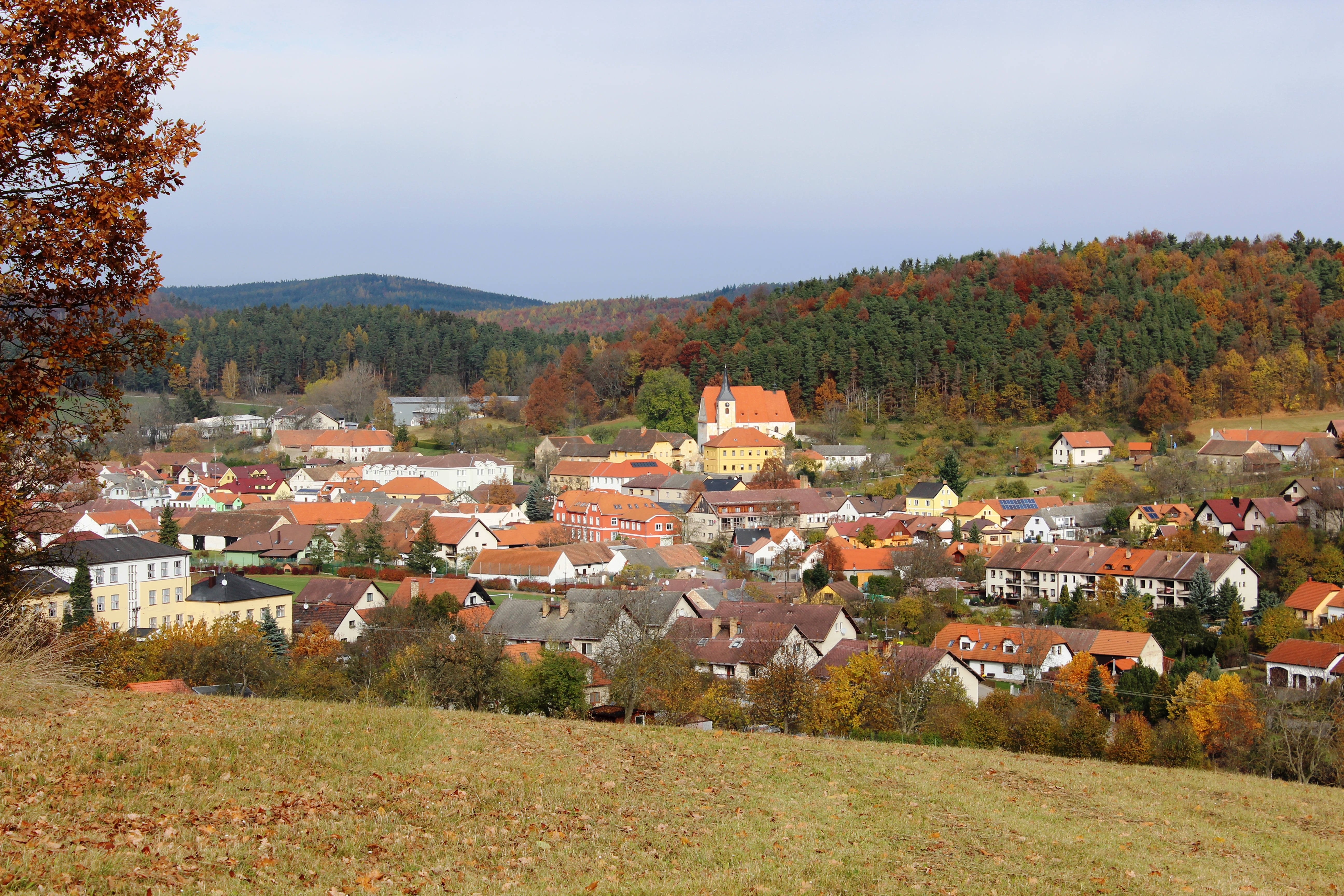 Pohled na obec a na okolí. Brloh (okres Český Krumlov). Česká republika.